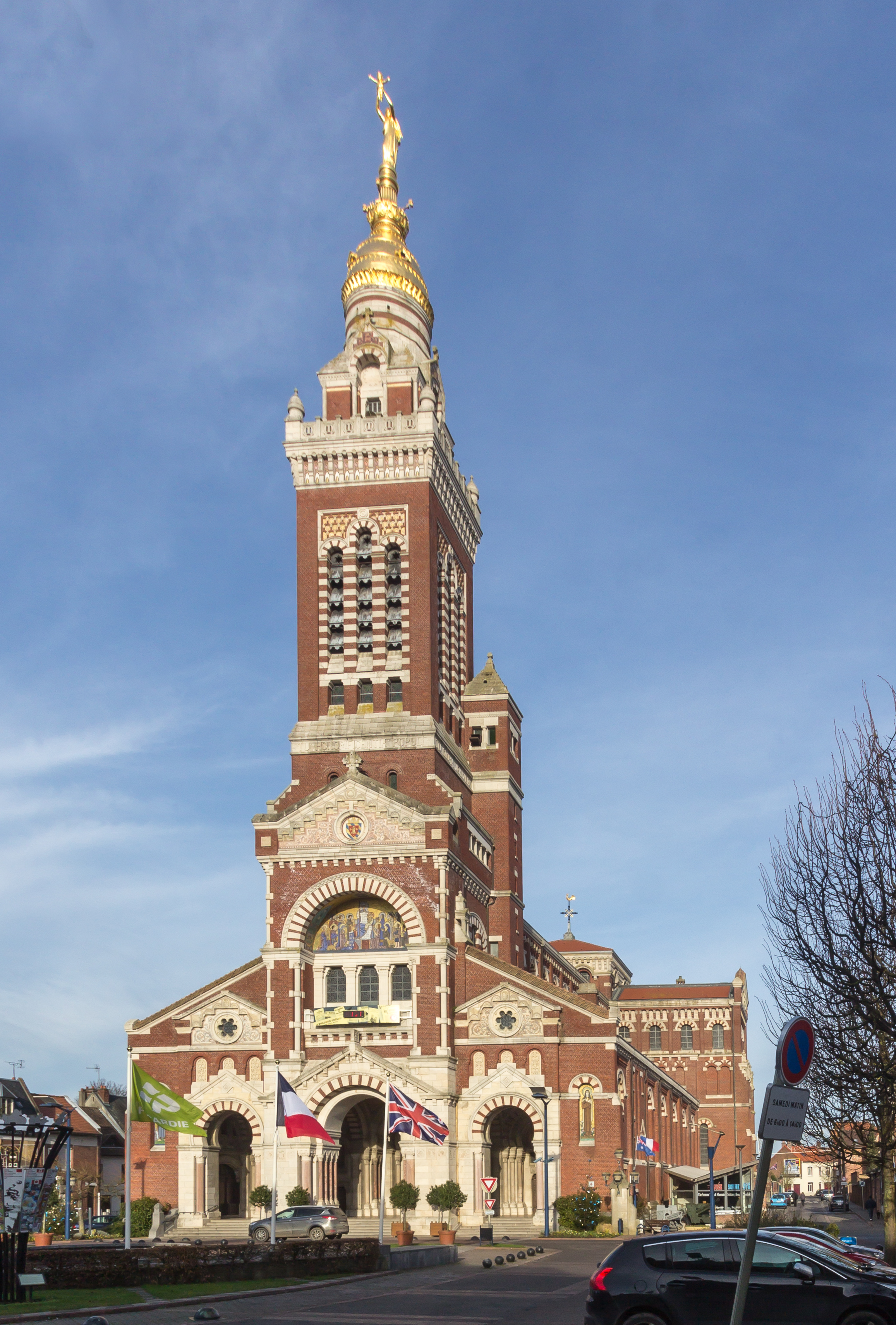 Basilique Notre-Dame de Brebières, Albert, Somme